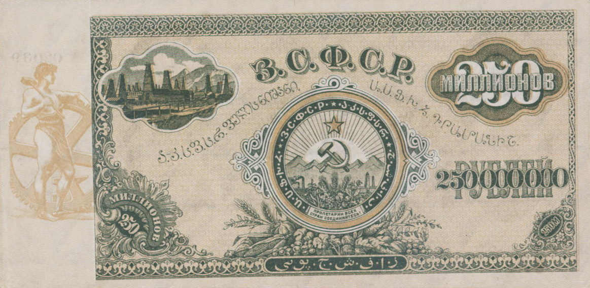 250 000 000 рублей 1924 года. ЗСФСР. Реверс.